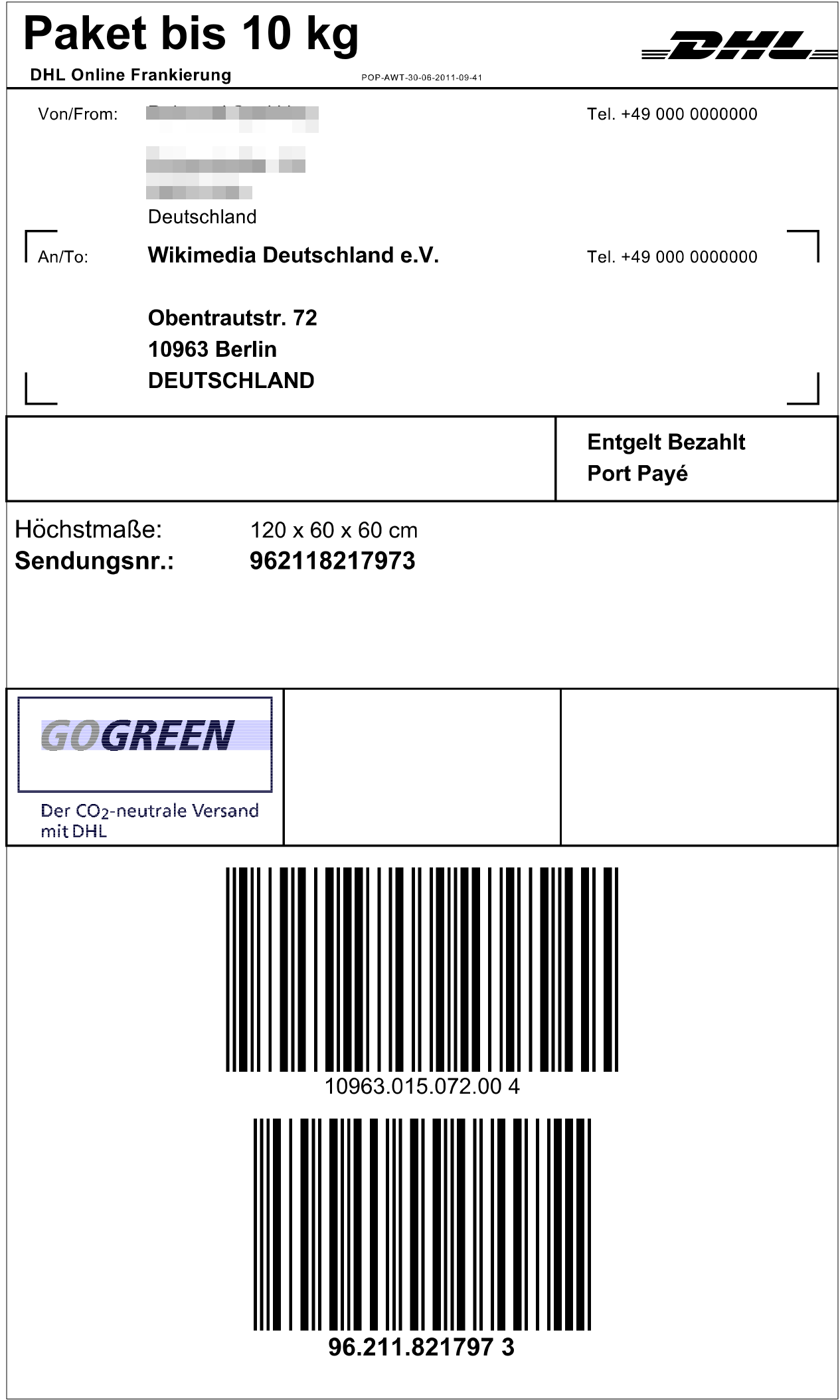 DHL Online-Frankierung für ein Paket bis 10 kg mit Strichode für Sendungsnummer und Zieladresse